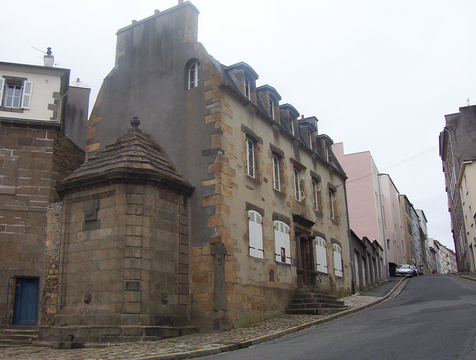 Maison de la Fontaine, quartier de Recouvrance, Brest. Il s'agit de l'une des plus vielles maisons de la ville.